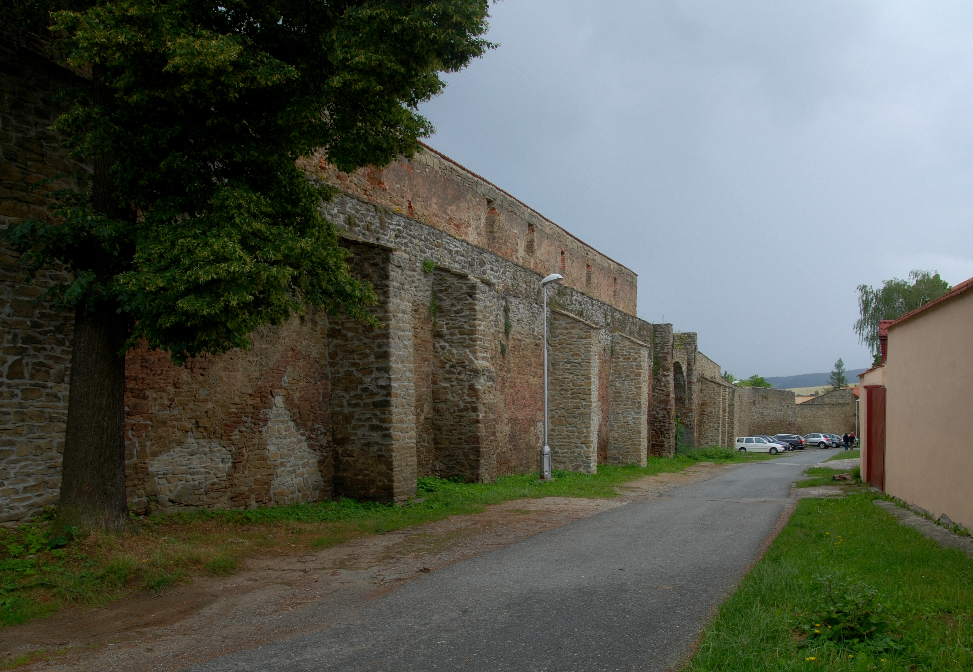 miasto Levoča